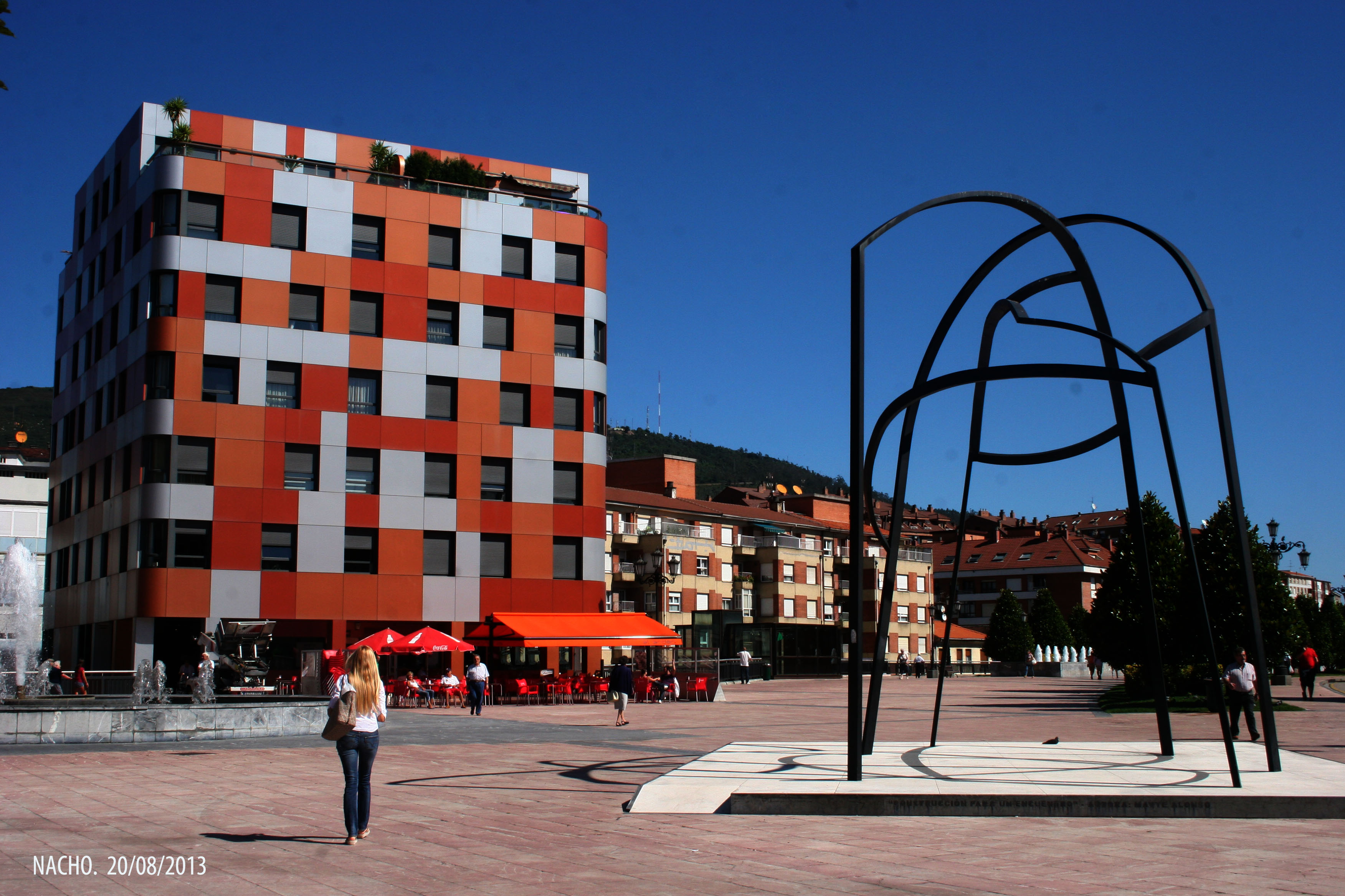 Oviedo